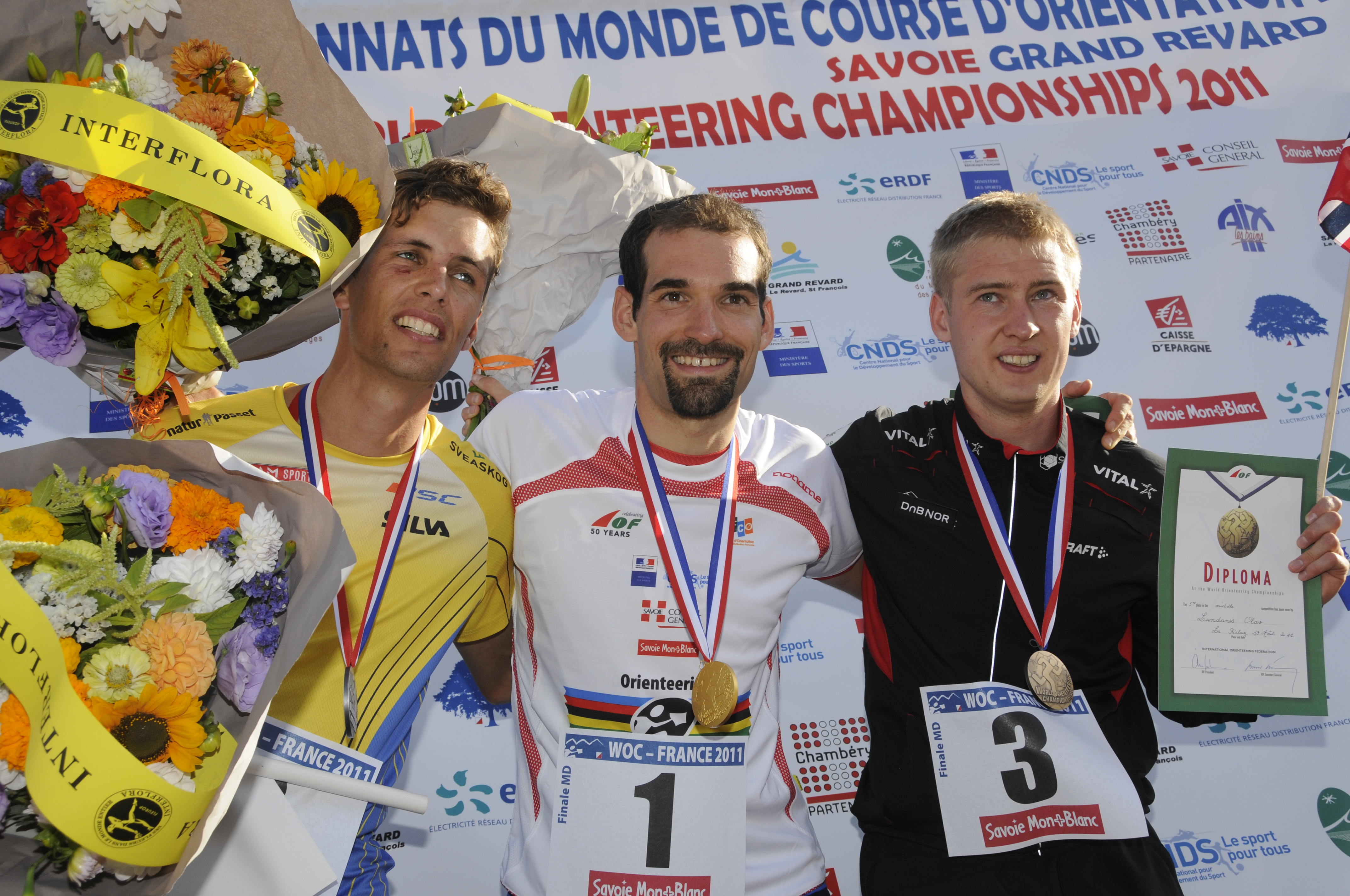 Prize giving ceremony at WOC 2011 (middle, men)